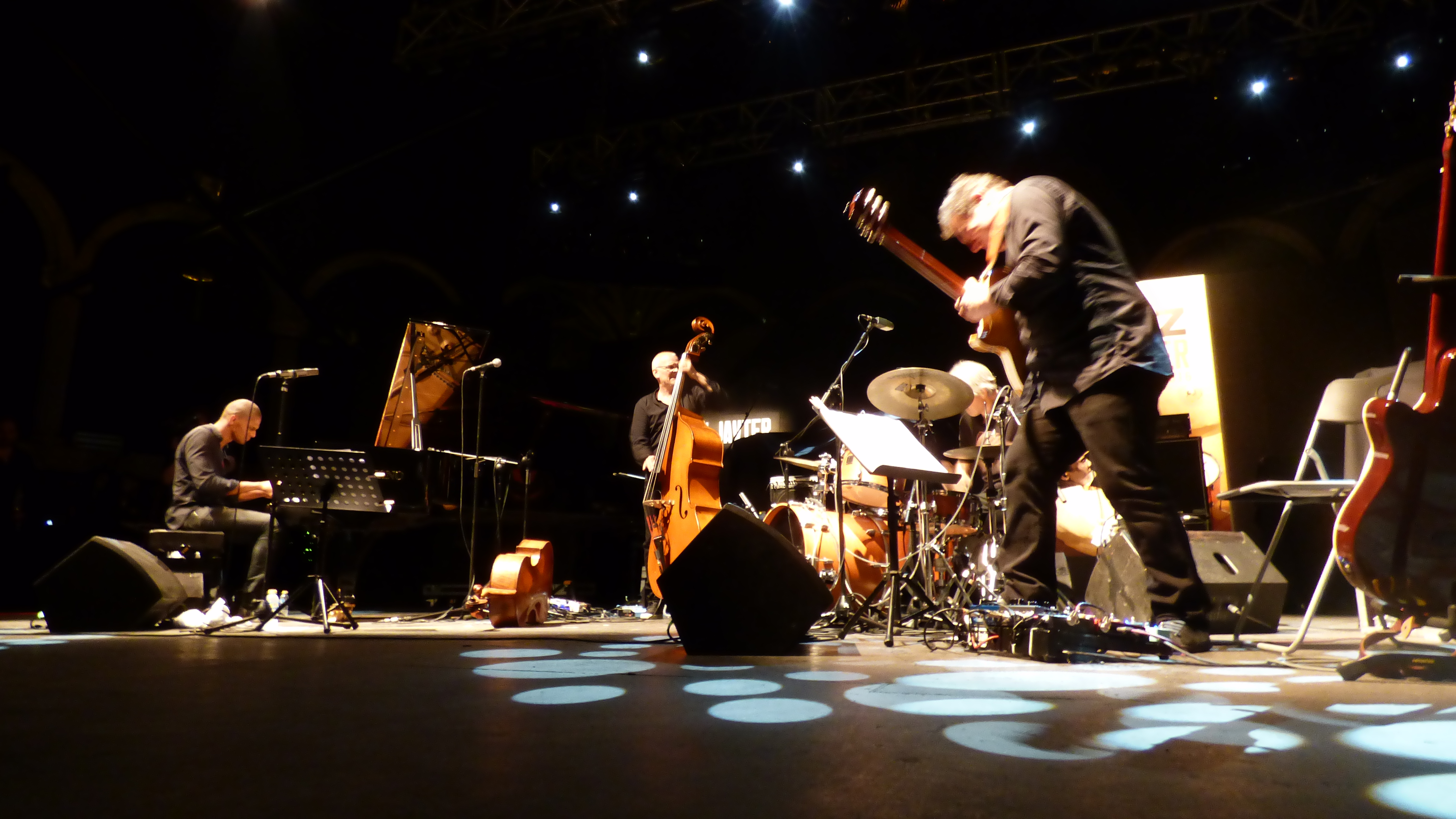 Lars Danielsson New Quintent, actuación en la XIX edición del Festival Internacional de Jazz de San Javier, 1 de julio de 2016